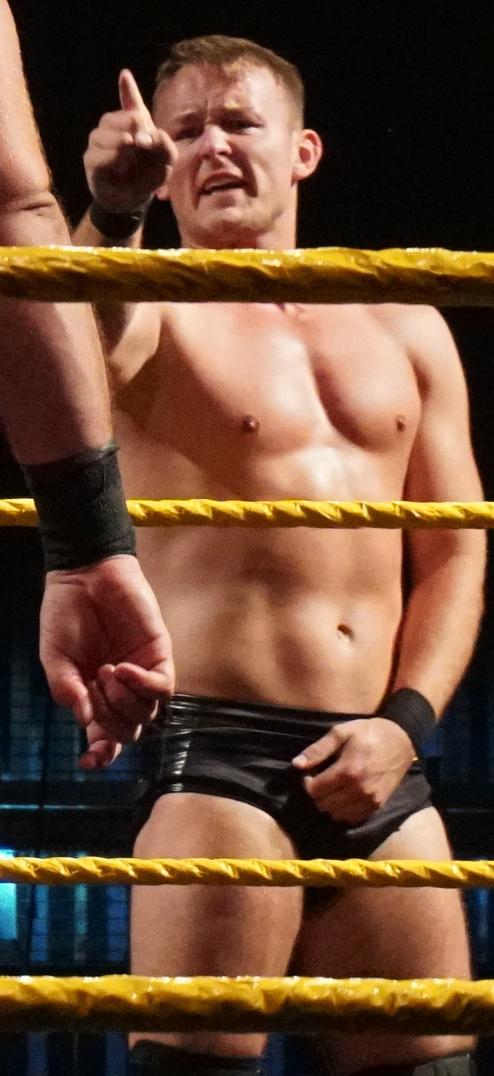 WWE Live 2018 - Antwerpen (NxT) - Otis Dozovic & Tucker Knight Vs Fabian Aichner & Marcel Barthel Otis Dozovic & Tucker Knight def. (Pin) Fabian Aichner & Marcel Barthel ( Bonne nouvelle pour les inconditionnels du catch en Belgique : le mardi 12 juin 2018, les superstars de NXT donneront le meilleur d'eux-memes au Stadsschouwburg Antwerpen, lors d'un show exclusif au Benelux. WWE NXT est une emission televisee creee en 2010, durant laquelle de jeunes catcheurs sont formes par des veterans comme Chris Jericho et C.M. Punk. Tous partagent le meme reve : devenir la nouvelle star du catch. Le programme WWE NXT a tres vite rencontre un enorme succes. Aujourd'hui, WWE NXT est connu comme une veritable machine a talents. Pensez par exemple a Seth Rollins, qui etait encore chez nous pas plus tard que l'annee derniere pour WWE Live. Cette annee encore, vous aurez la chance de voir a l'oeuvre de nombreux nouveaux talents du catch ! A l'affiche, on trouve notamment Aleister Black, Adam Cole, Undisputed Era, Velveteen Dream, Ricochet, Nikki Cross, Shayna Baszler et Kairi Sane. Le line-up reste sujet a des changements de derniere minute. Attendez-vous a un show sensationnel et plein de tension ! )